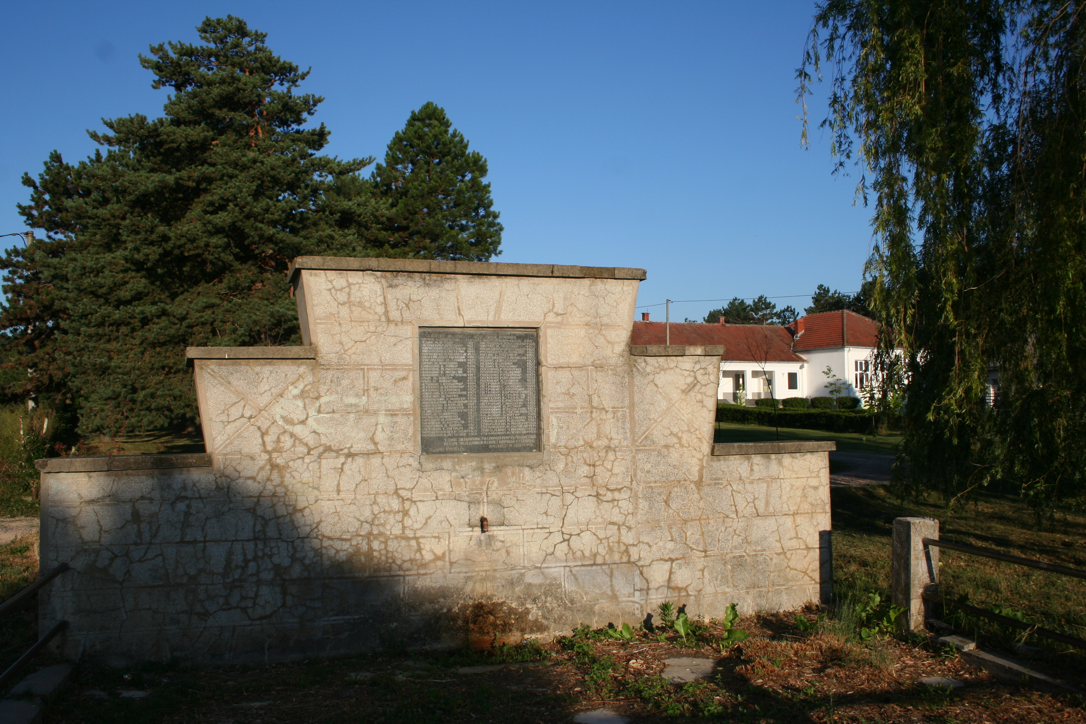 Bajevac, Škola i spomenik